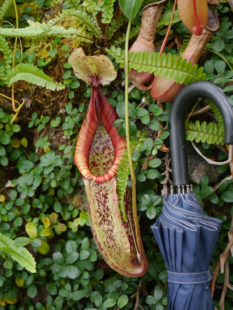 Nepenthes 'Dyeriana' 2017/01/15 兵庫県立フラワーセンター：Hyogo Prefectural Flower Center